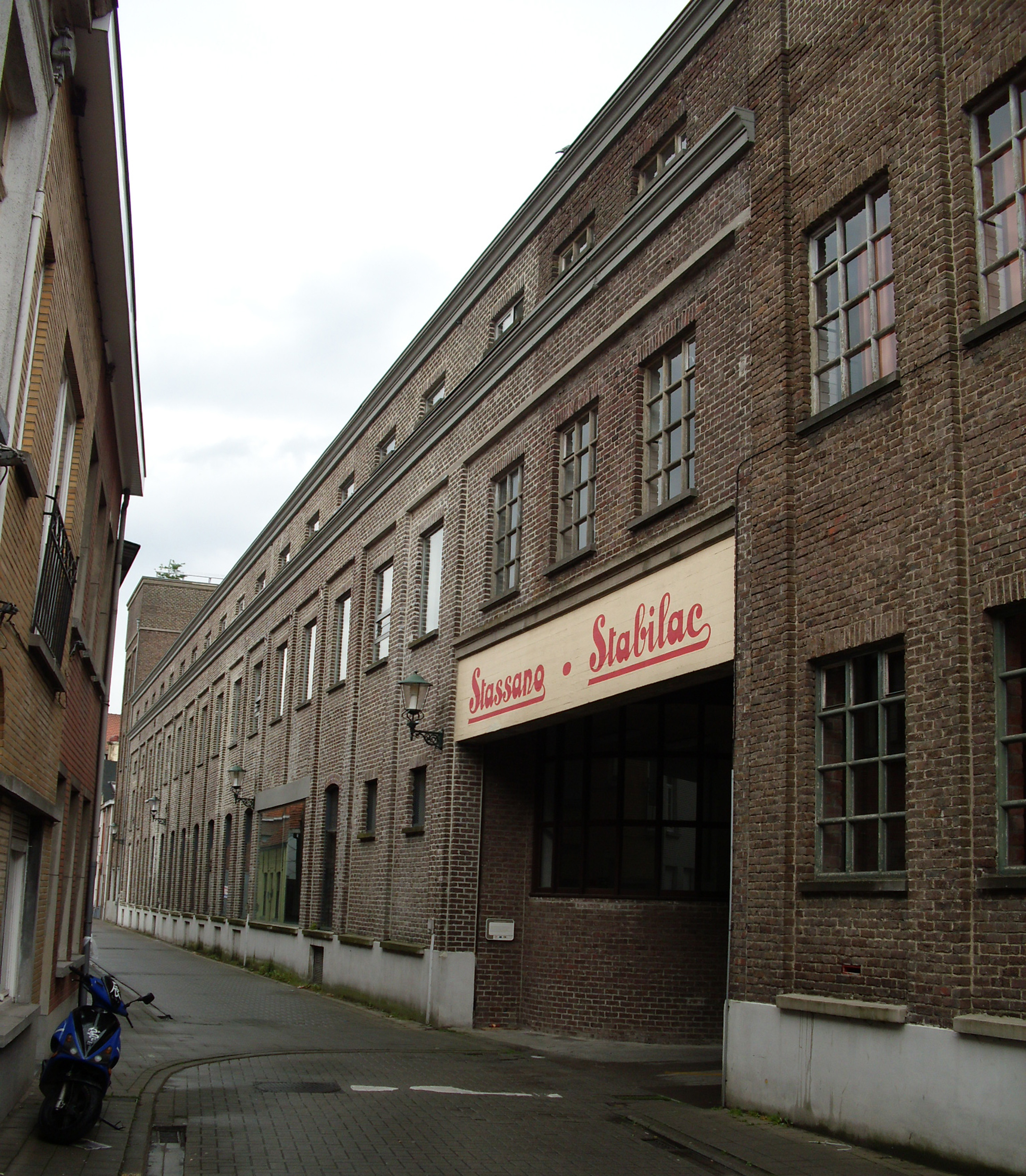 Voormalige zuivelfabriek Stassano - Raamstraat - Eeklo - Oost-Vlaanderen - Vlaanderen - België